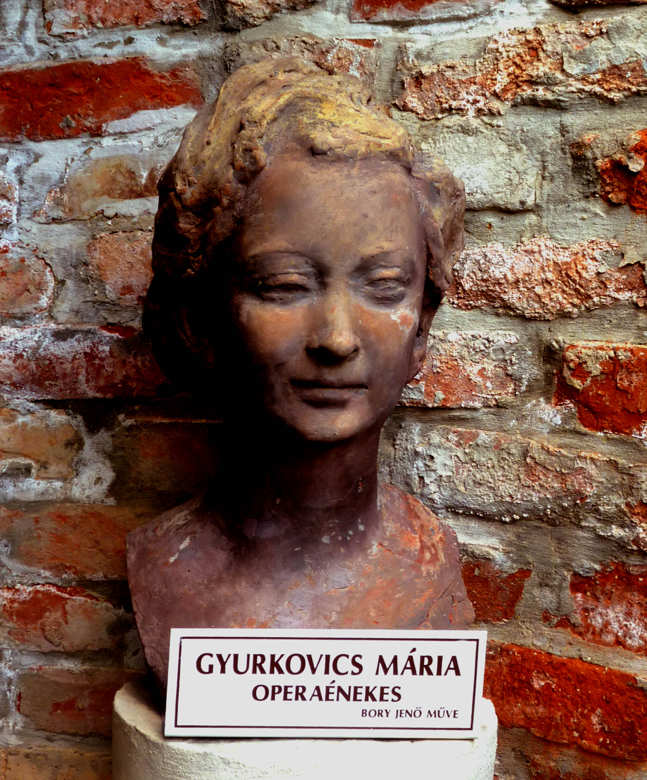 Bory Jenő: Gyurkovics Mária mellszobra (Bory-vár, Székesfehérvár)